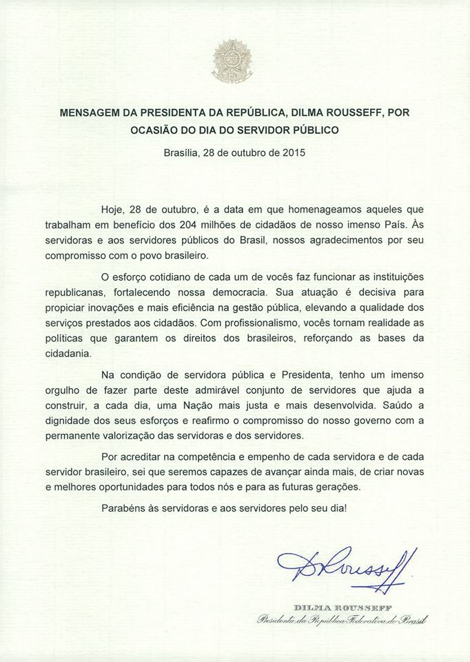 Mensagem da Presidência da República, governo Dilma Rousseff, pelo dia do servidor público brasileio.